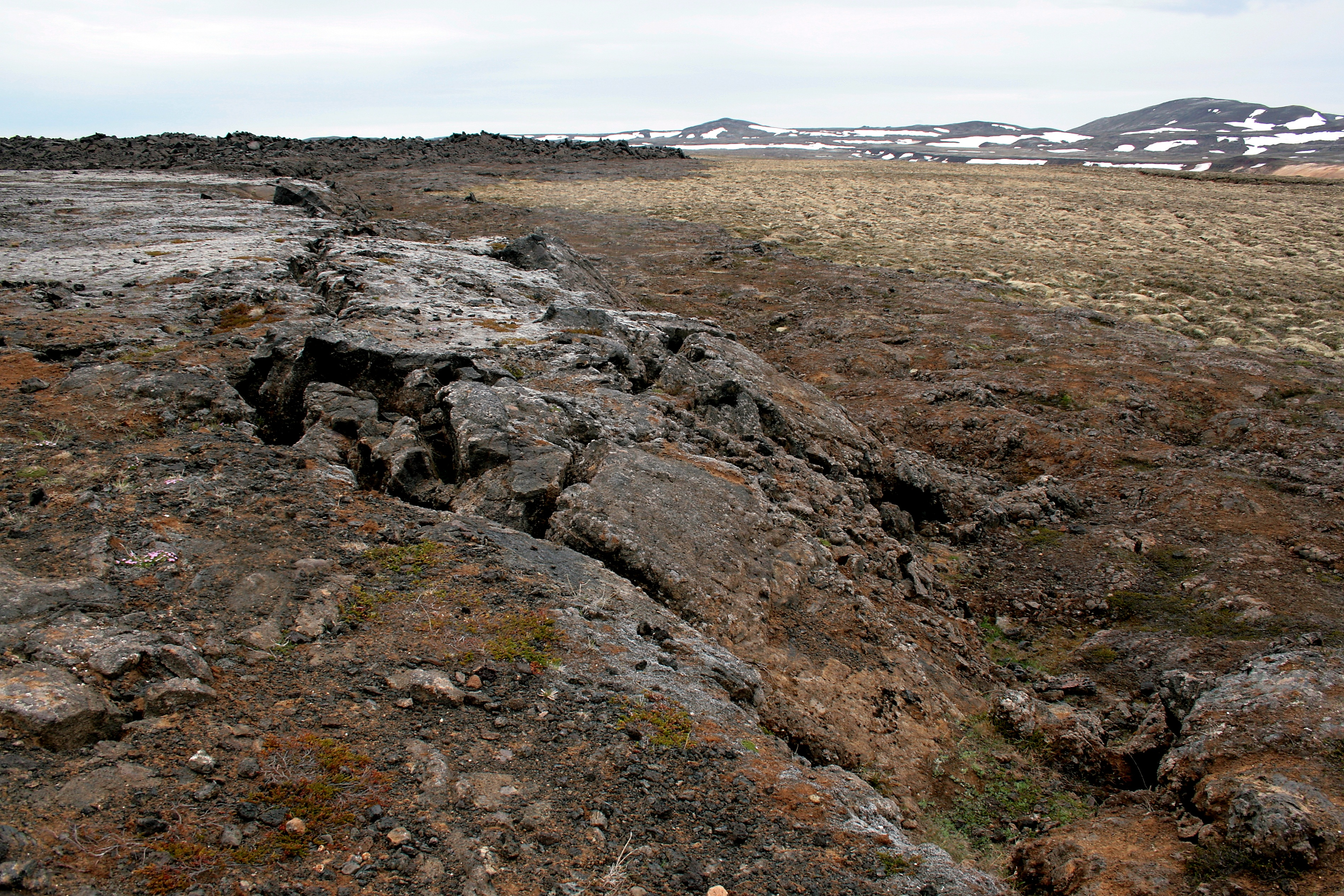 Nahe bei Leirhnjúkur